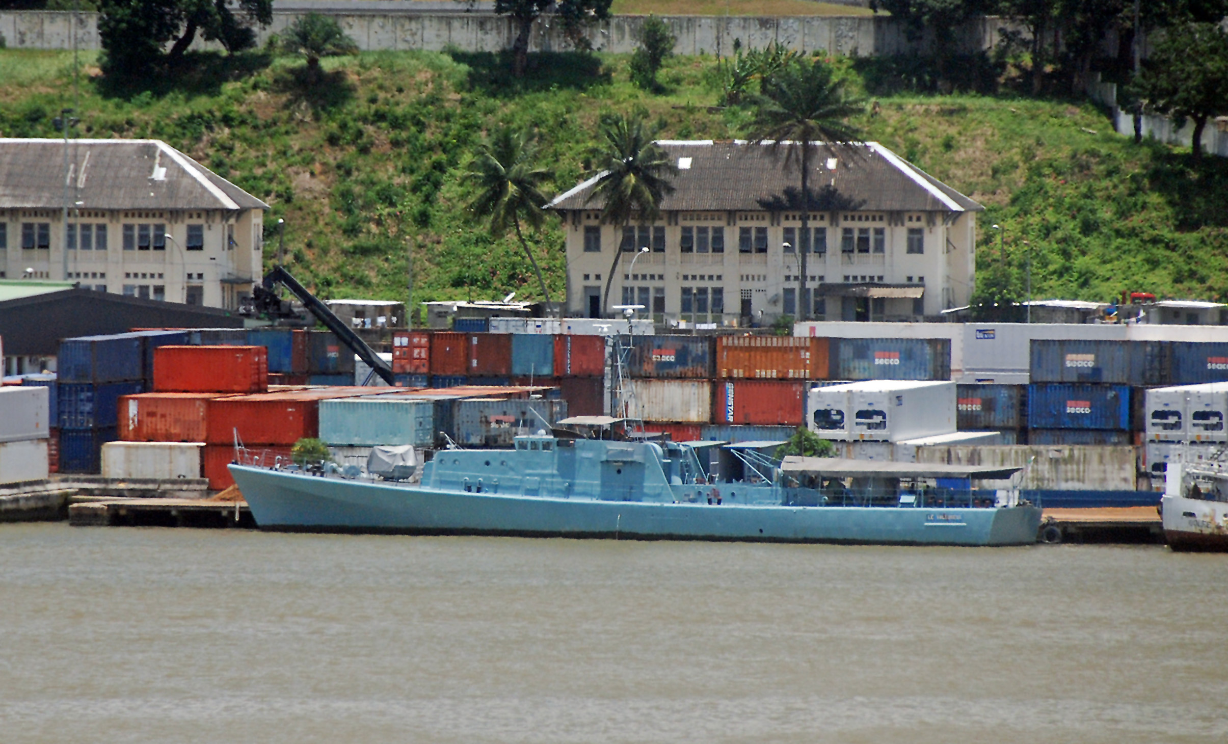 navire le vigilant ivoirien